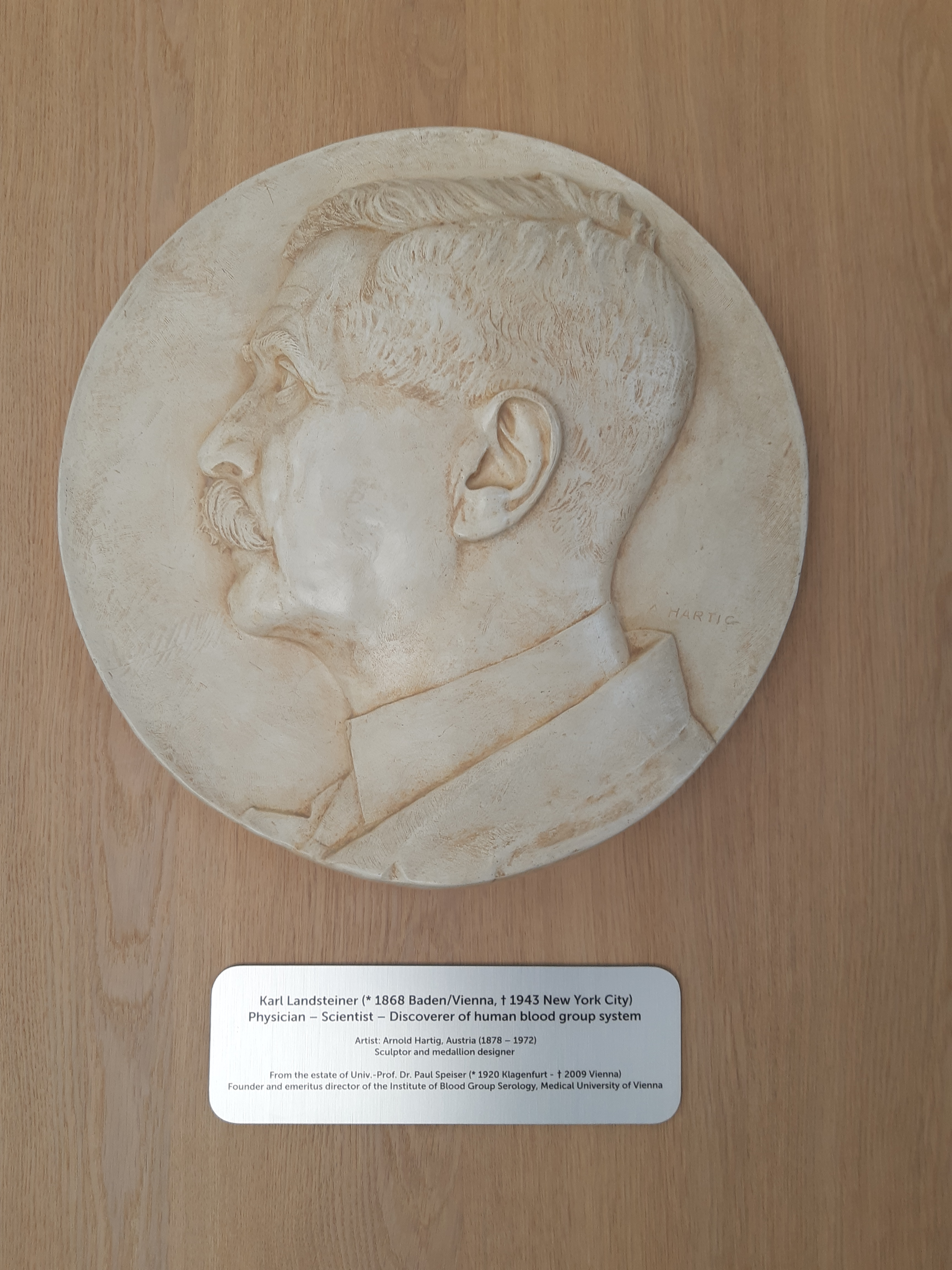 Gedenktafel (Künstler: Arnold Hartig) mit Portrait Karl Landsteiners im Eingangsbereich der Karl Landsteiner Privatuniversität Krems